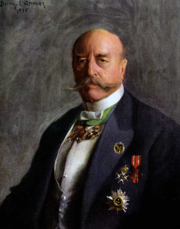 Adolf Bratt (1849-1934)